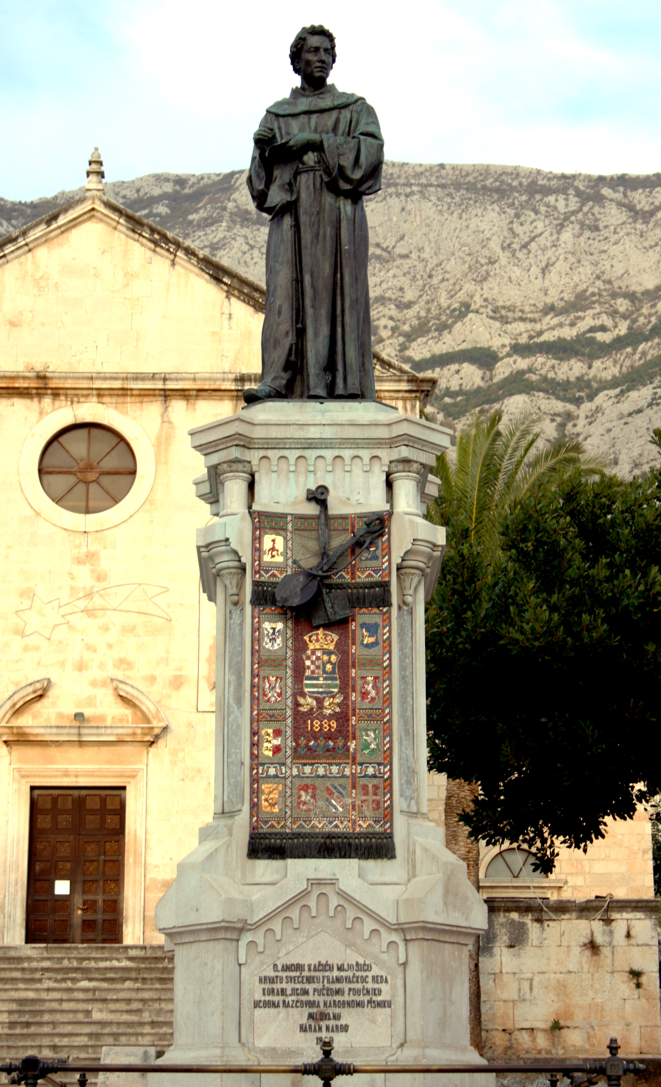 Makarska: Andrija Kačić Miošić (* 17. April 1704; † 14. Dezember 1760) kroatischer Dichter, Franziskanermönch.